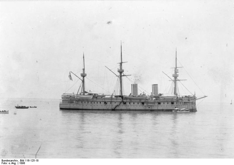 China 1898 Tsingtau Schiff "Dmitrij Donskoj"